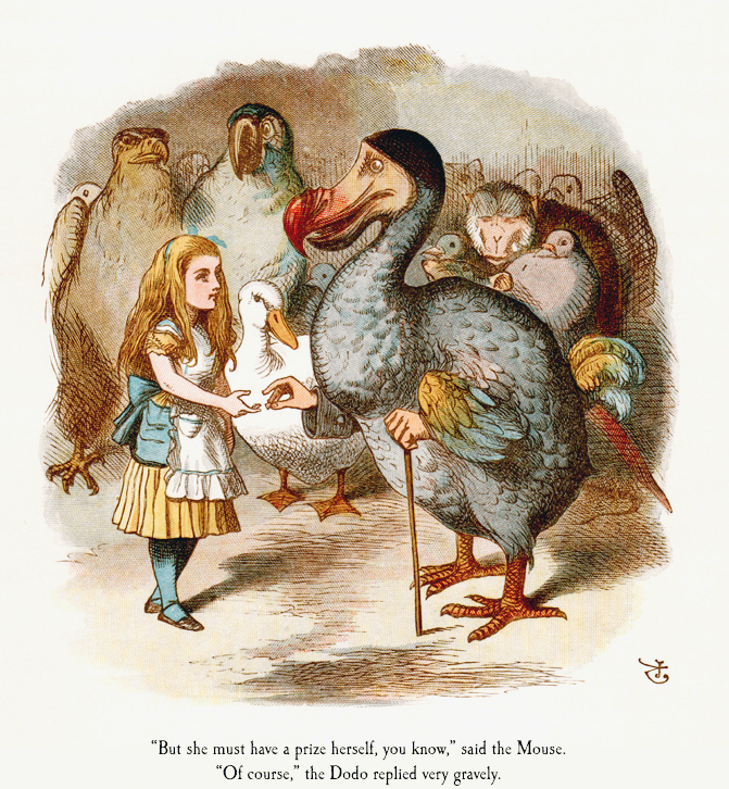 אליס ודודו